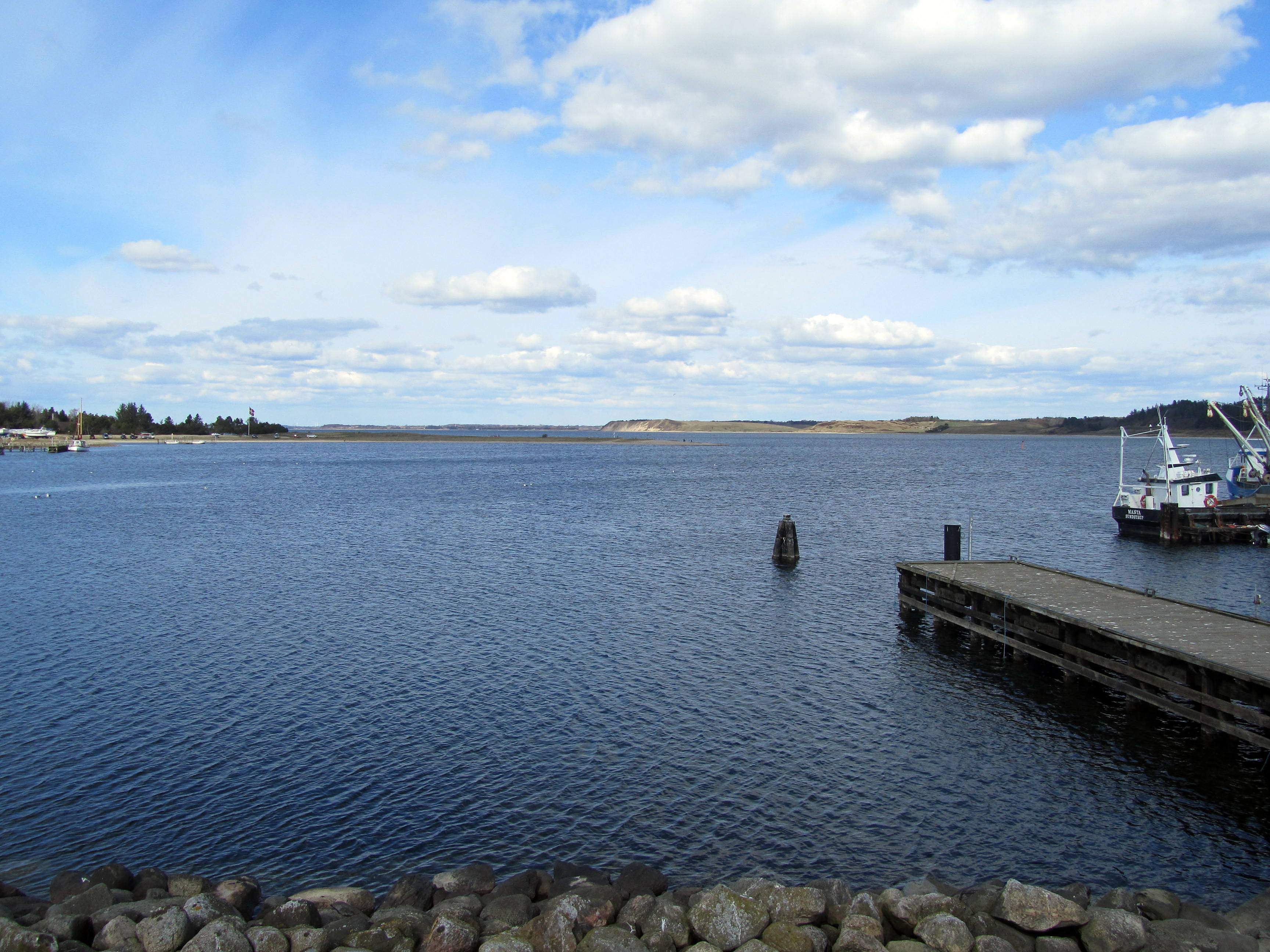 Lovns Bredning set mod nord fra Virksund med Ulbjerg Klint i baggrunden